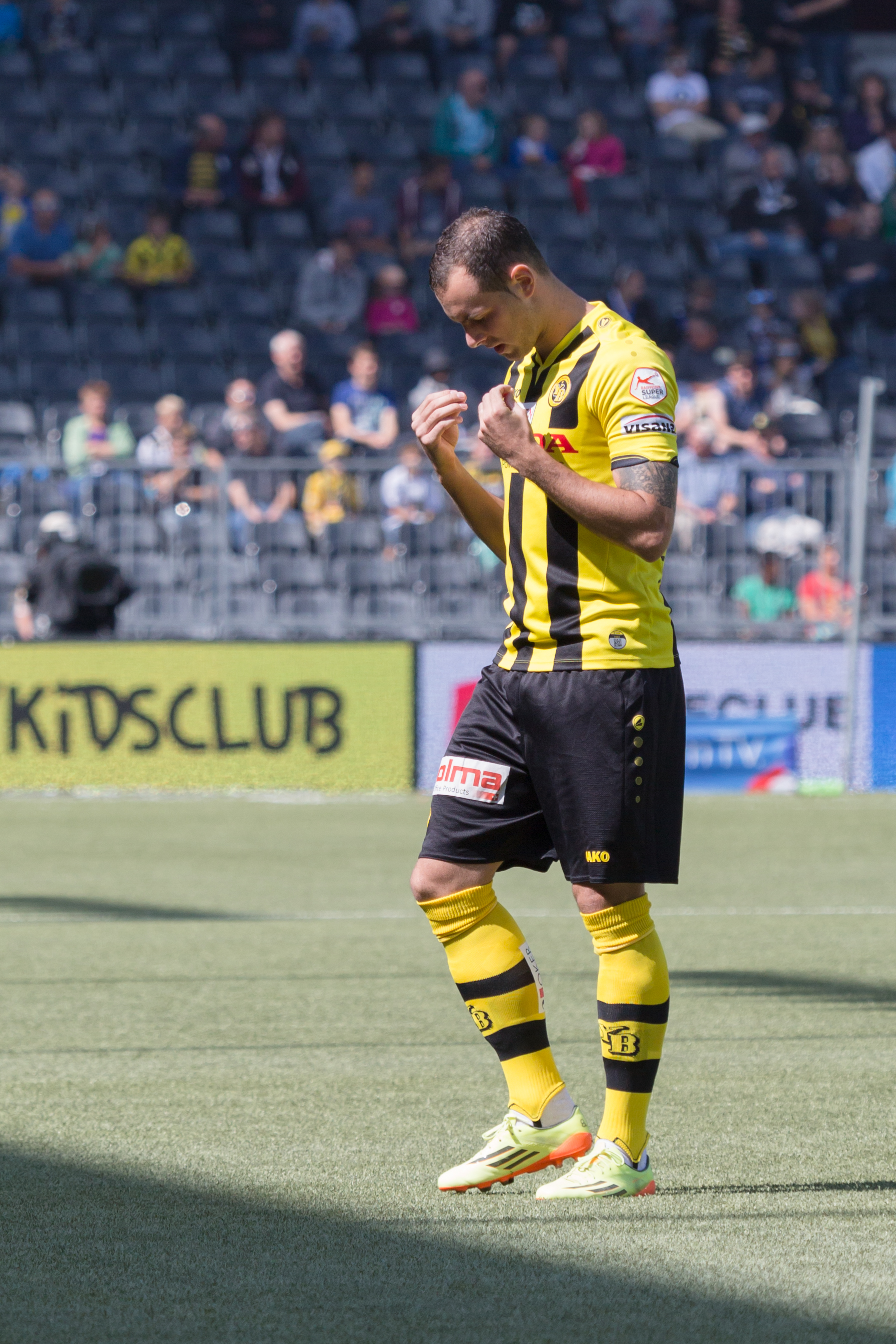 Jan Lecjaks vor dem Anpfiff des Spiels des BSC Young Boys gegen den FC Luzern